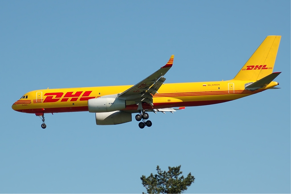 Aviastar-TU Tupolev Tu-204